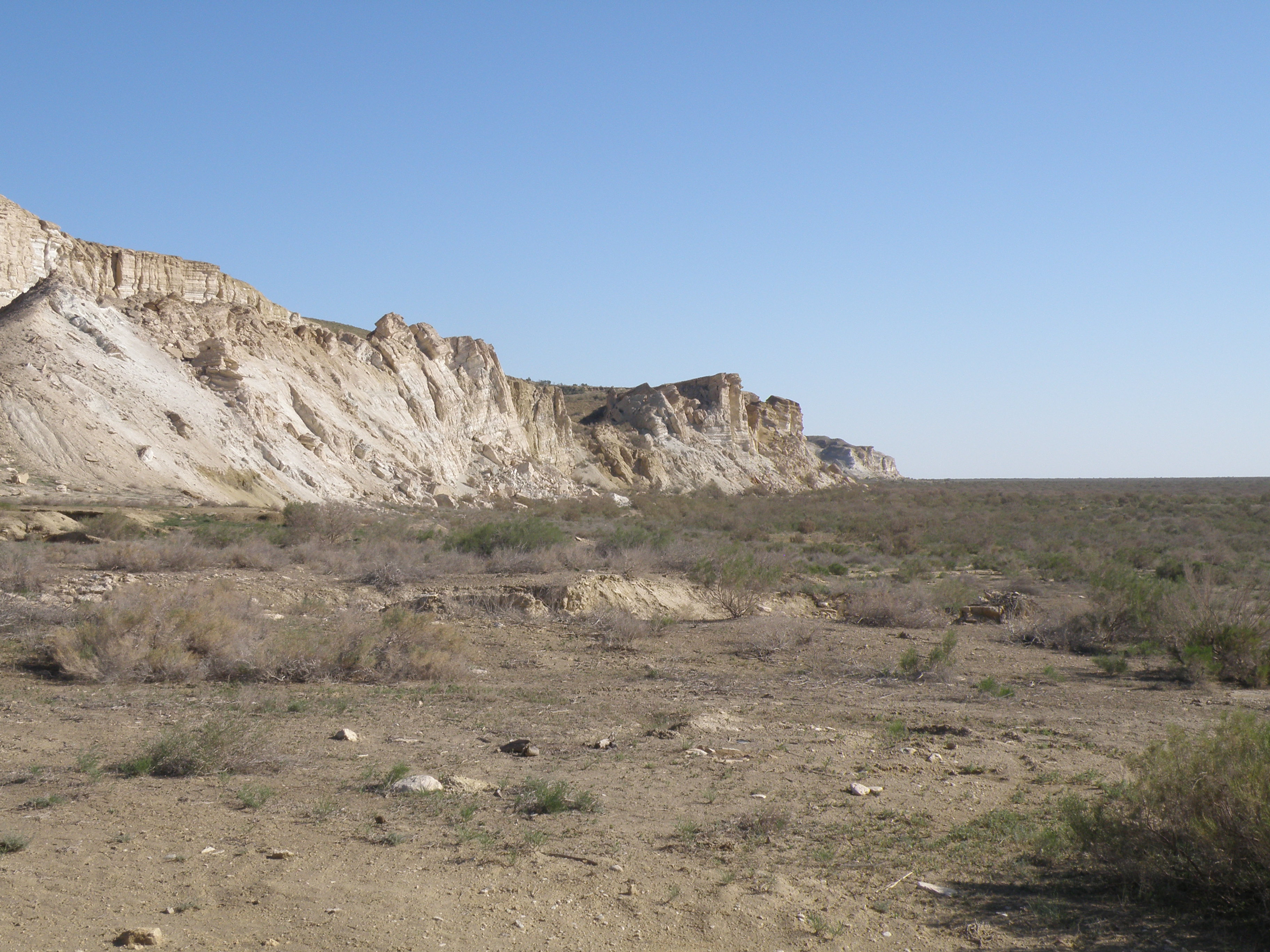 Falaises dominant l'ancien rivage occidental de la mer d'Aral - Rebords du plateau d'Oust-Ourt.